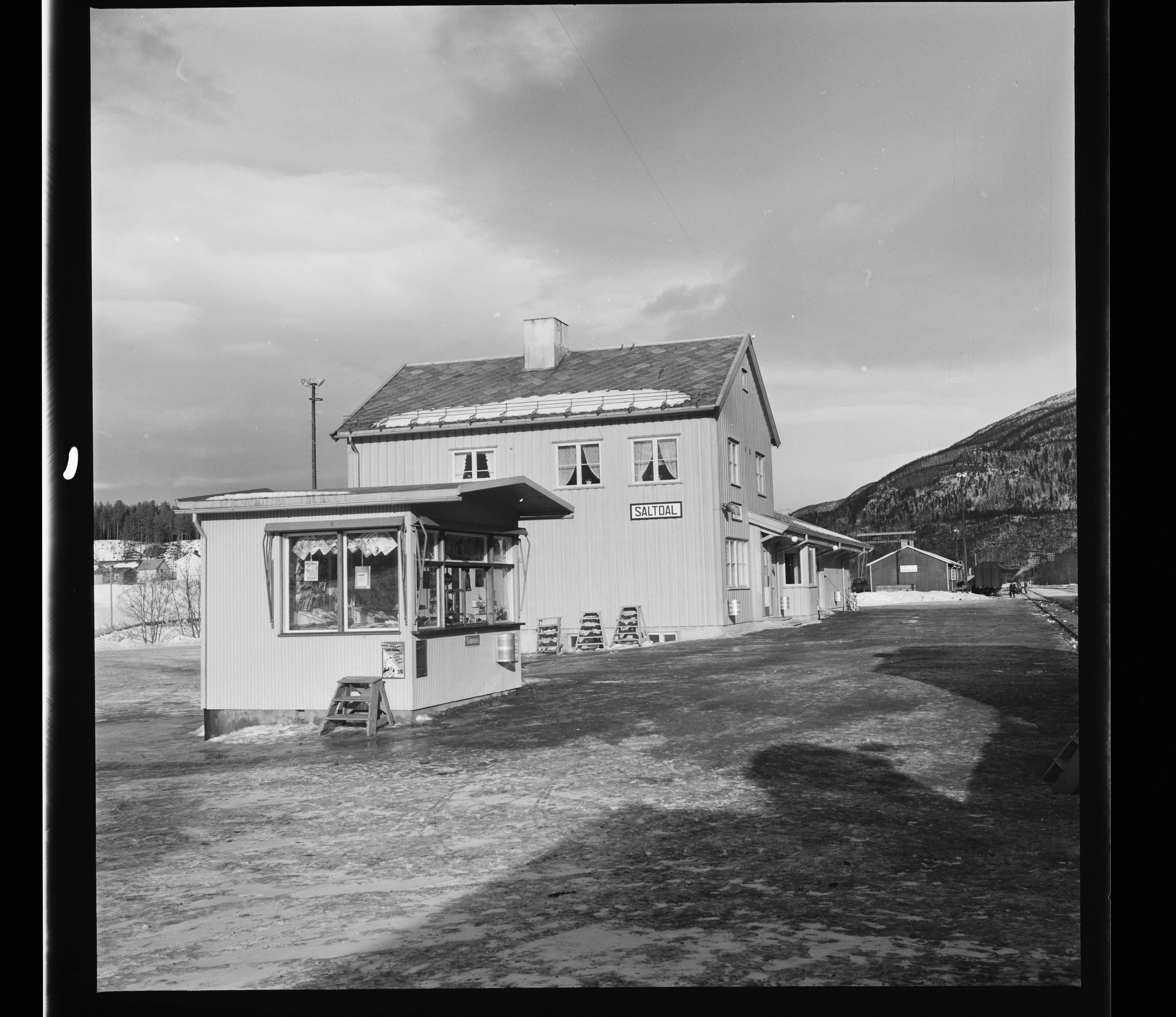 Bildet er hentet fra Nasjonalbibliotekets bildesamling Røkland,Saltdalen, Saltdal, Nordland